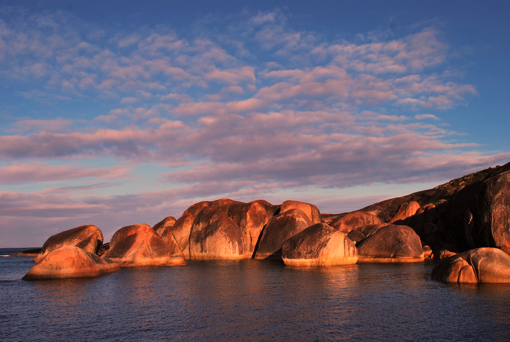 Elephant Rocks, Denmark, Western Australia